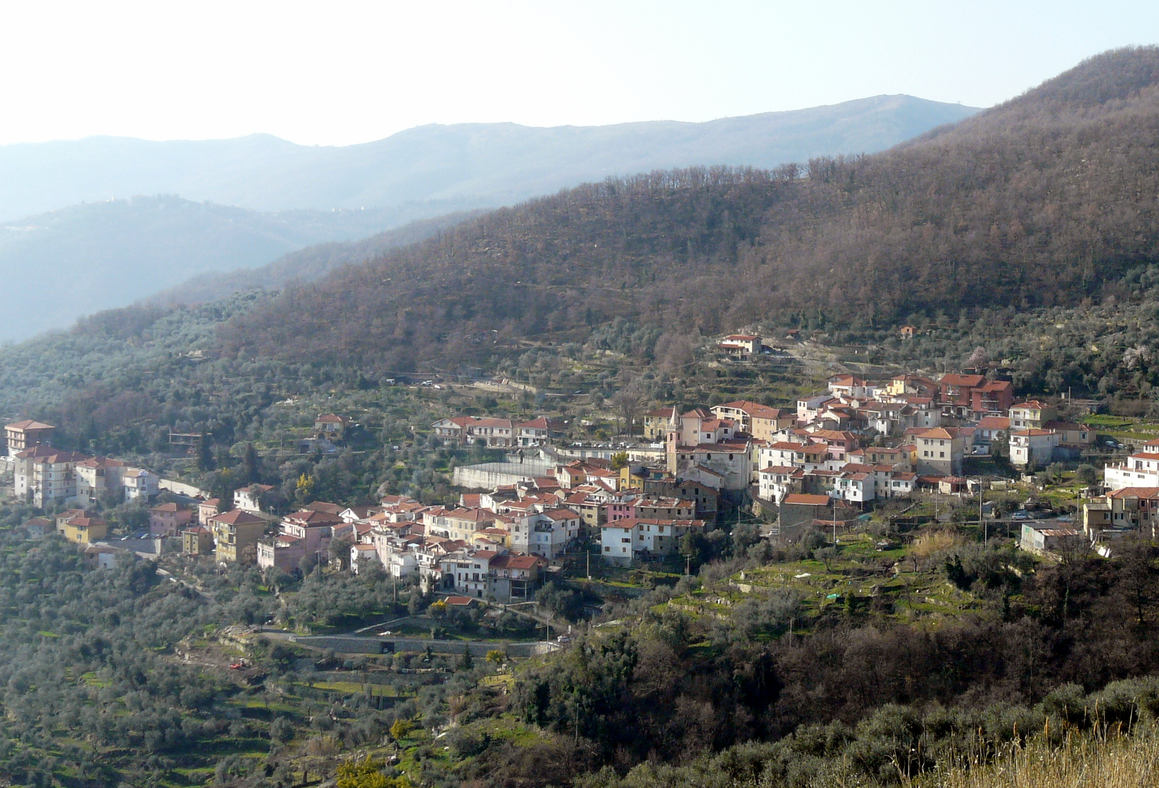 Caravonica, Liguria, Italia